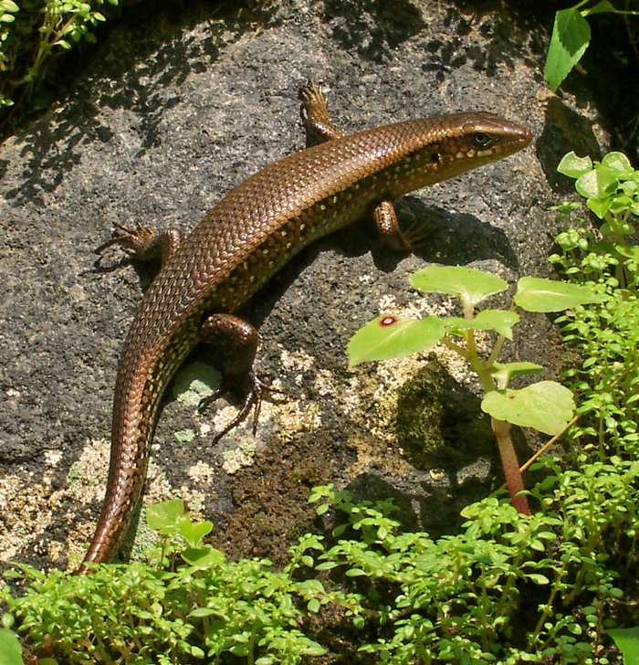 Mabuya multifasciata, basking female; from Kuningan, West Java, Indonesia